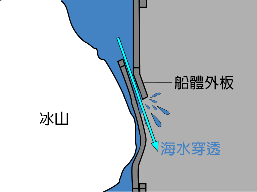 圖片顯示冰山如何挫曲了英國皇家郵輪鐵達尼號的船體外板、鉚釘鬆開並損壞一系列水密艙室，導致鐵達尼號沉沒。